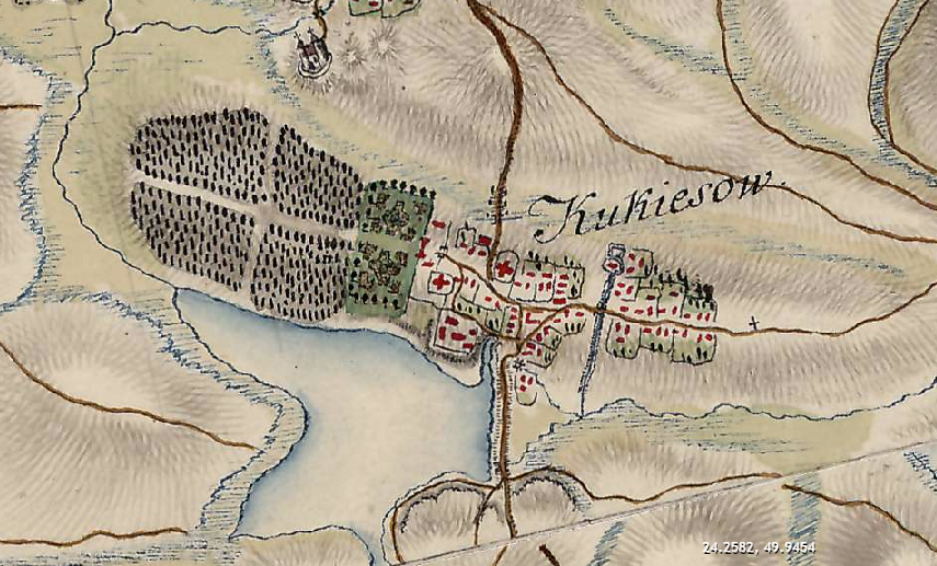 xviii